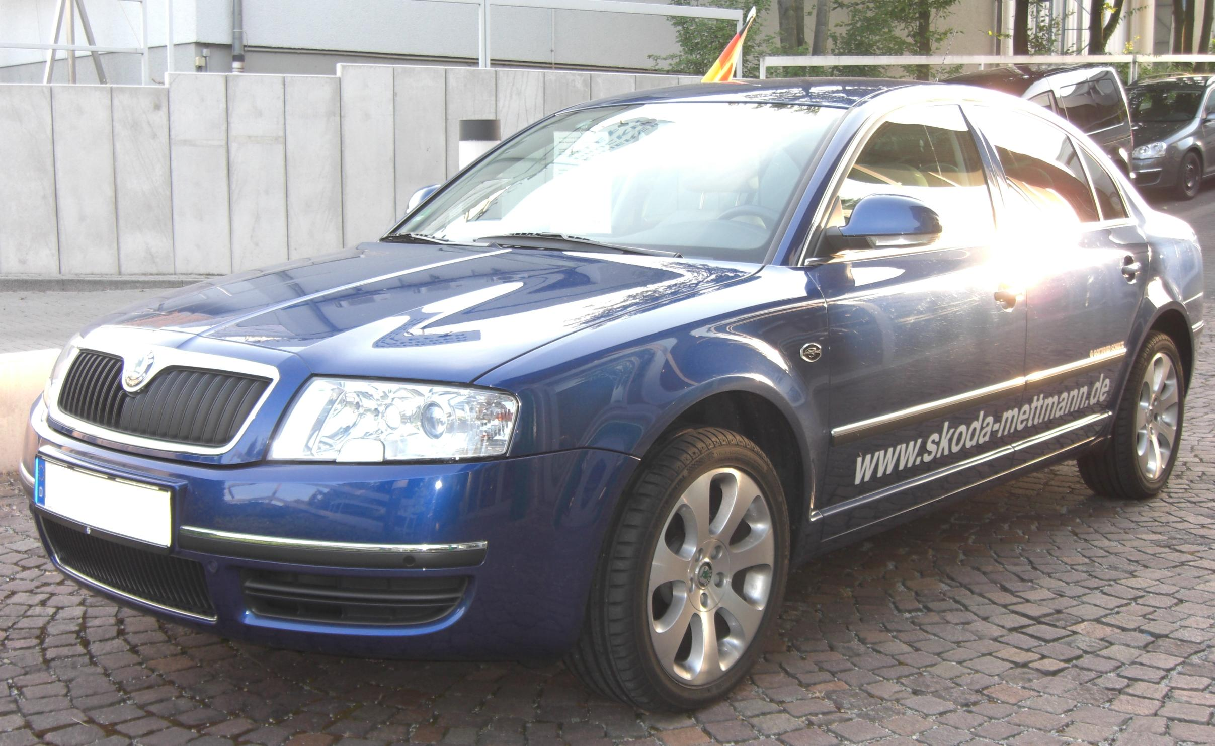 Škoda Superb Facelift